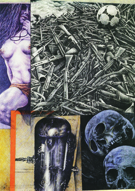 Peter Sorge, Variationen (über rundliche und längliche Gegenstände), 1982, Farb- und Graphitstift auf Karton, 99 x 70 cm (Diptychon)